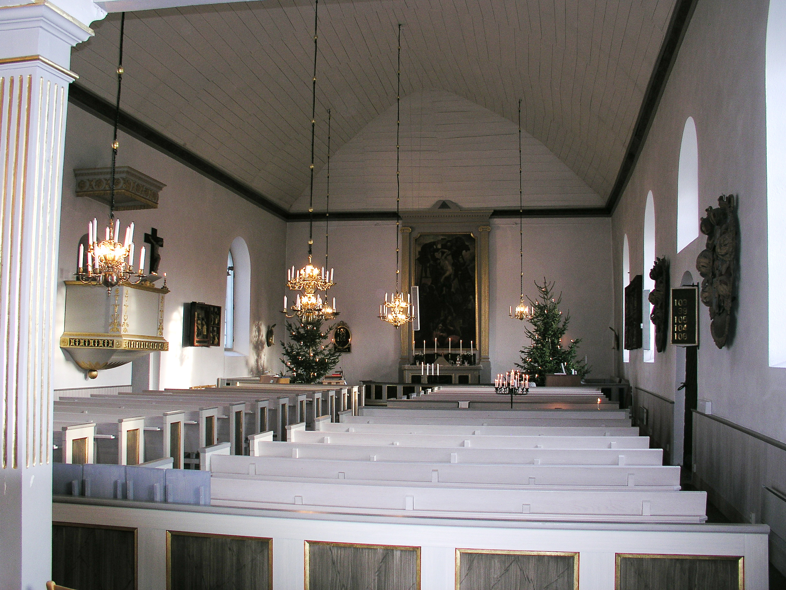 Nave, Rystad church, Diocese of Linköping, Linköpings kommun, Sweden